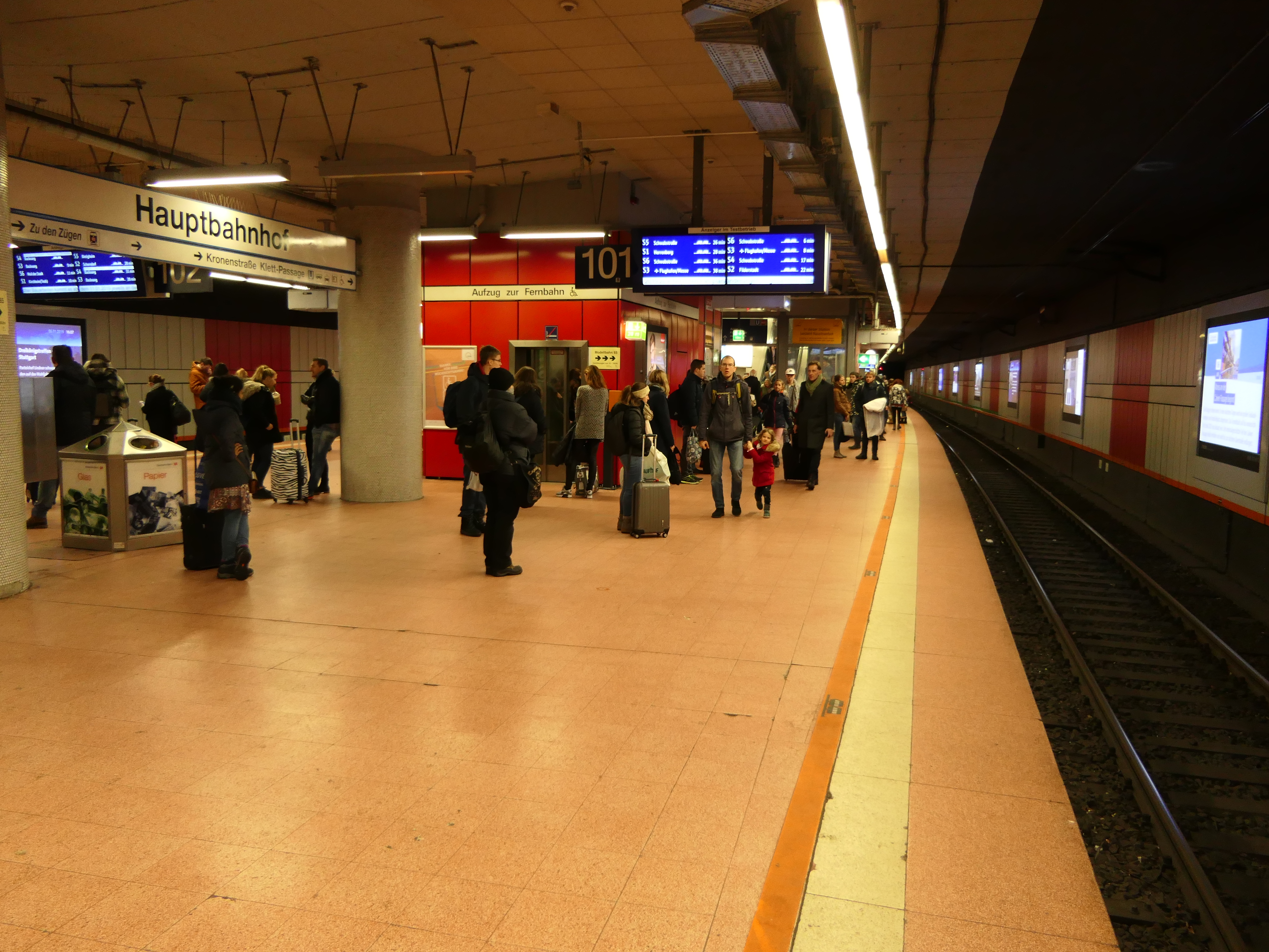 Unterirdische S-Bahnstation Hauptbahnhof in Stuttgart.